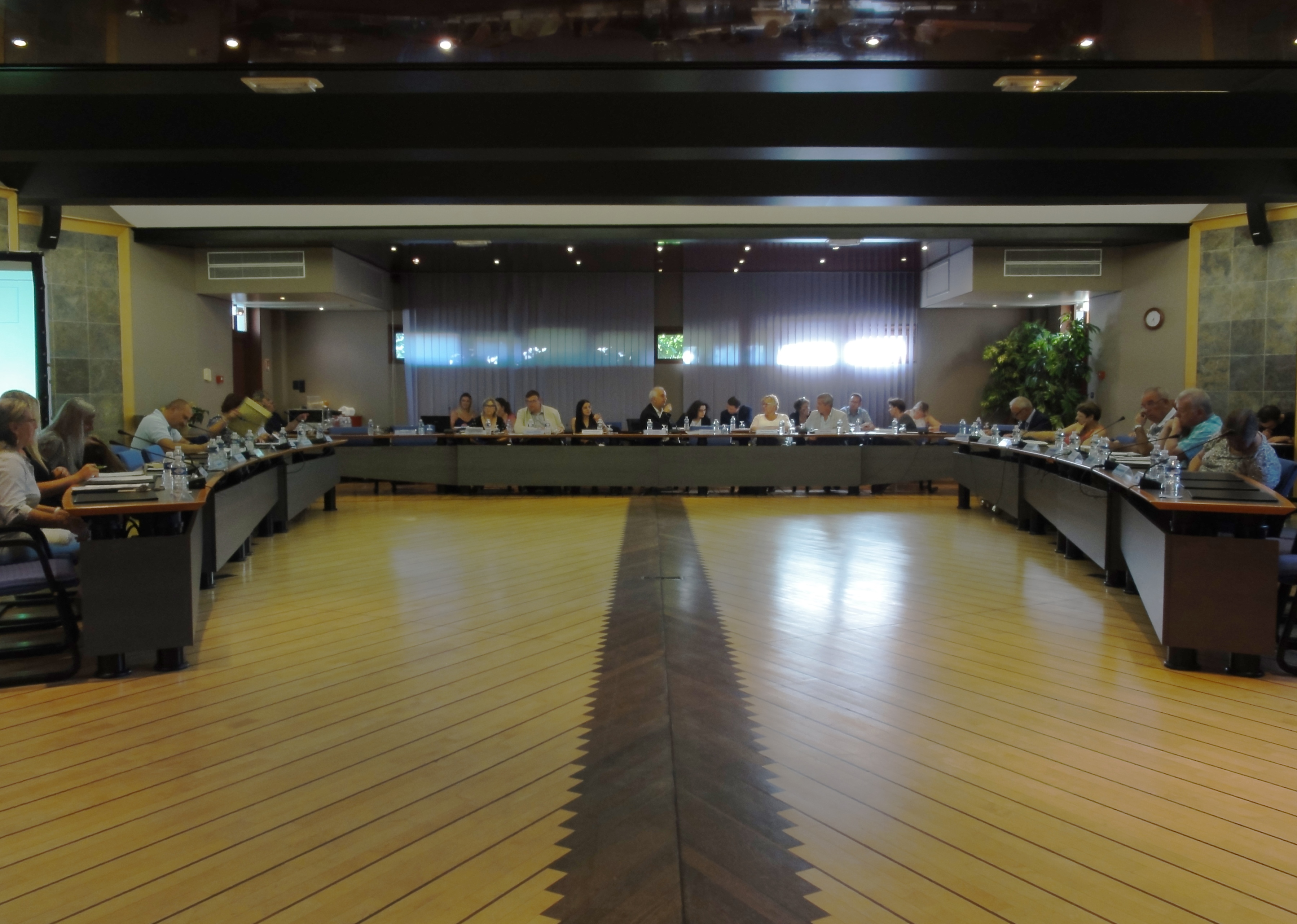 Loon-Plage (Nord) salle du conseil municipal